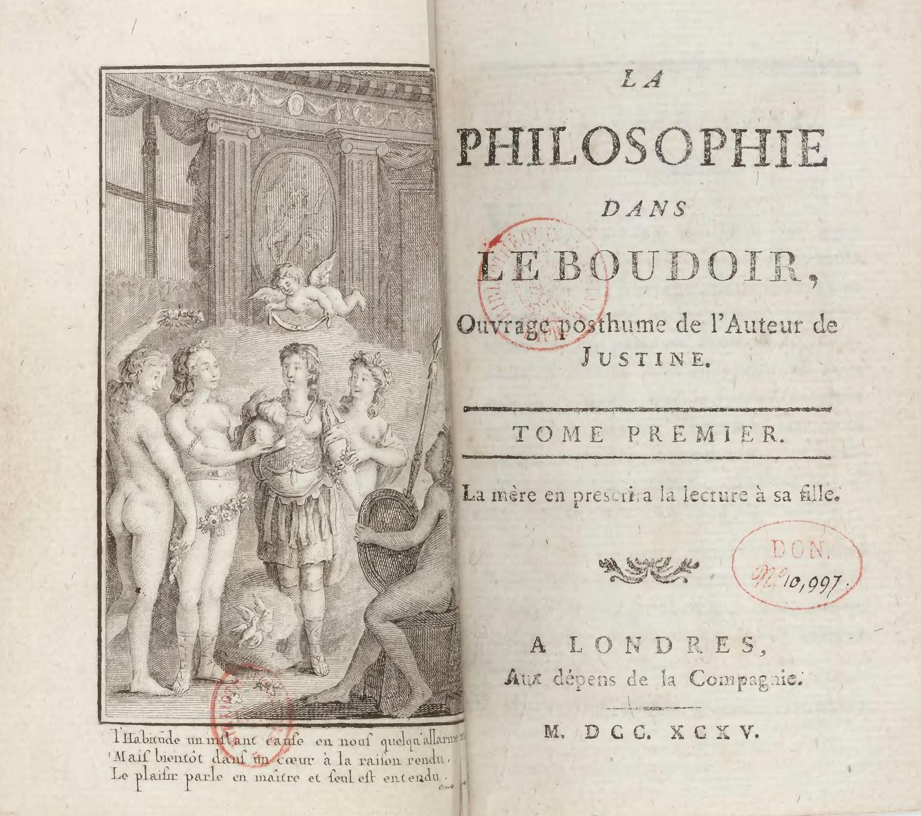 illustration du fichier djvu sur commons